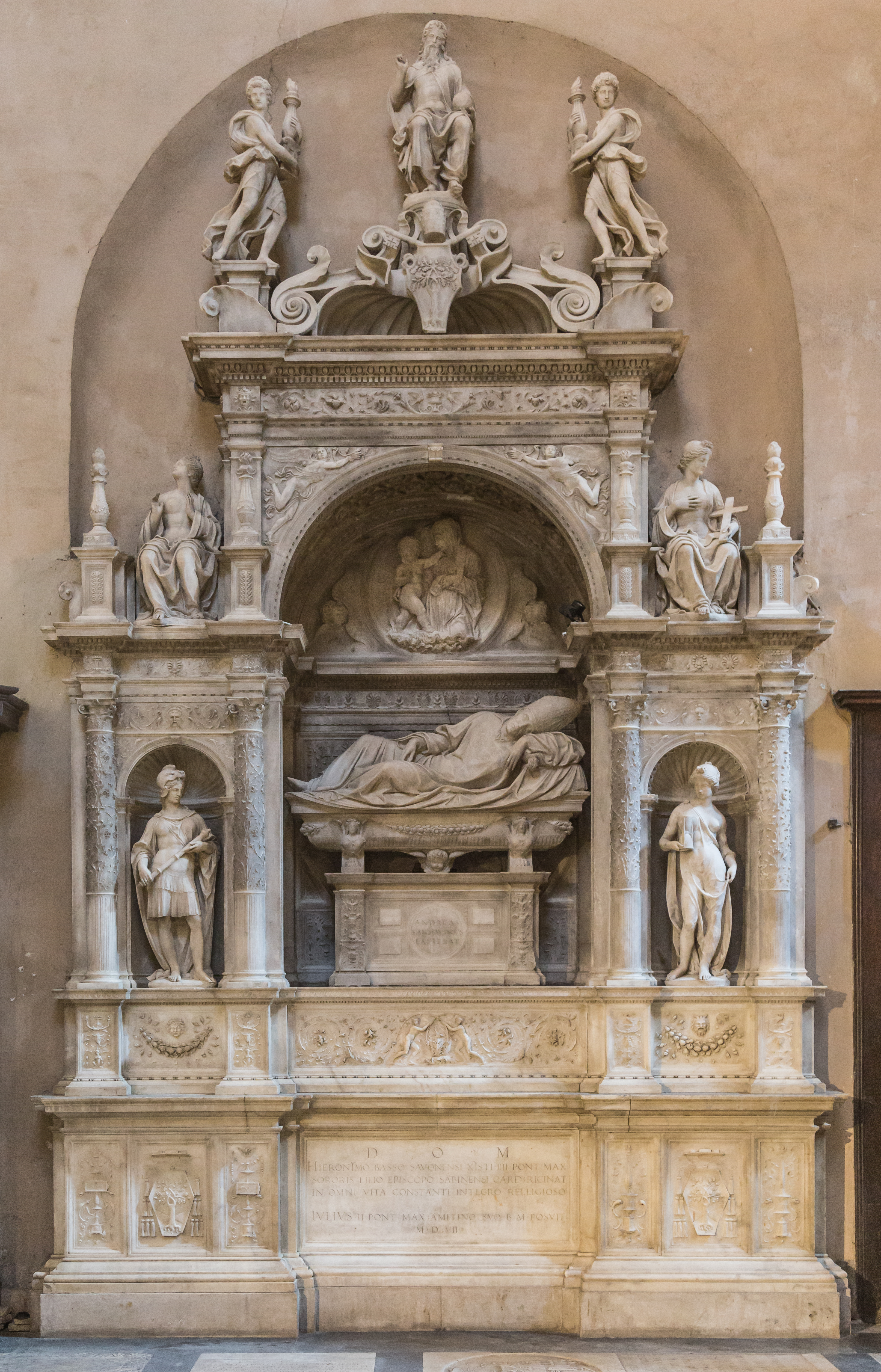 Rom - Basilika Santa Maria del Popolo